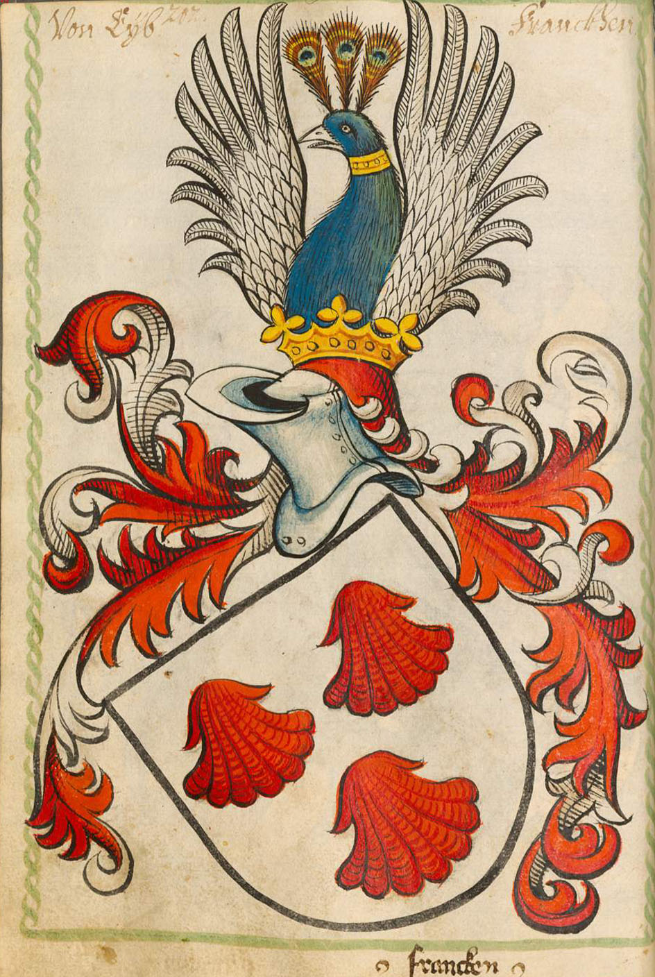 Scheibler'sches Wappenbuch , älterer Teil Eyb